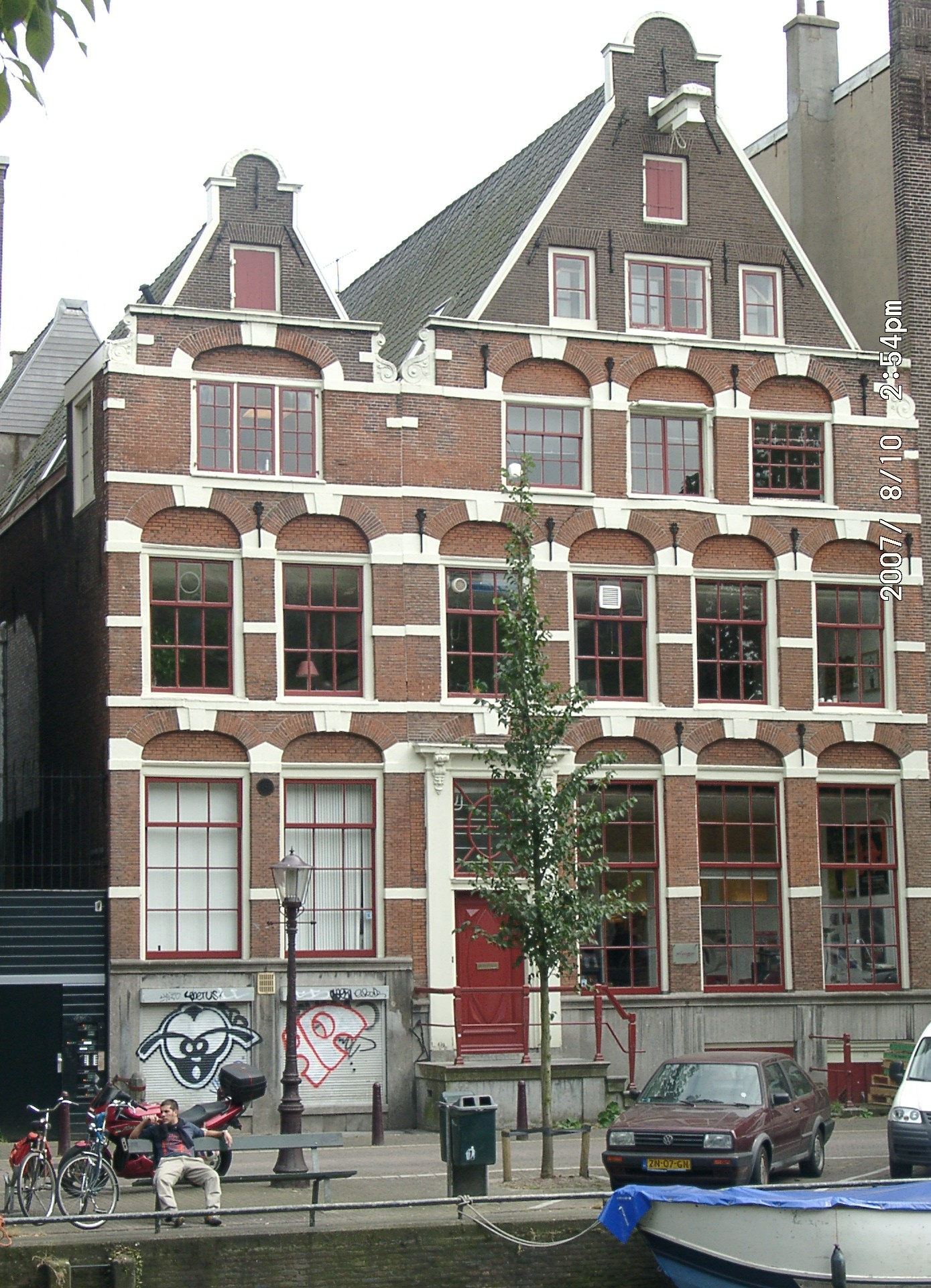 Kloveniersburgwal 23, Amsterdam. Lange tijd bewoond door leden van het Amsterdamse patriciërsgeslacht Valckenier